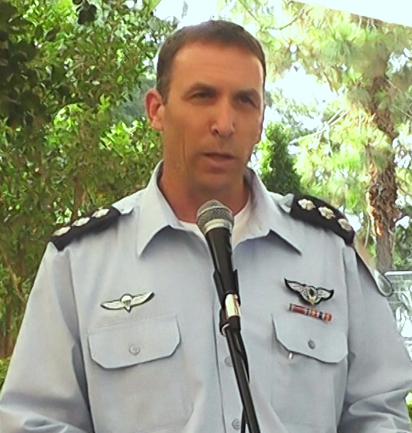 אלוף משנה מתן כהנא נושא דברים לזיכרו של חברו עמנואל מורנו, בבמהלך האזכרה בהר הרצל במלאת 11 שנים לנפילתו. כ"ה אב תשע"ז, 17-8-2017 קרדיט: "רווח הפקות".